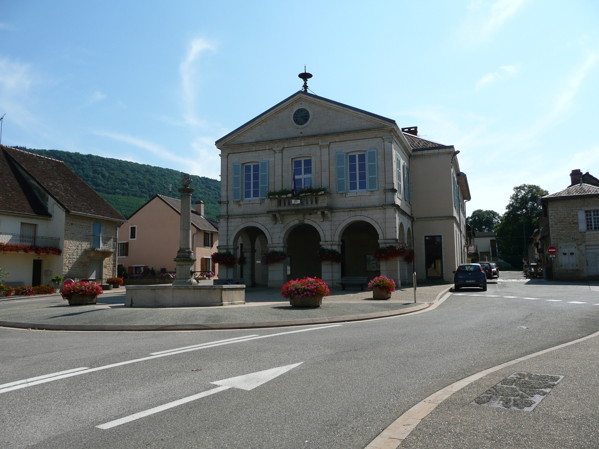 Place de la Mairie de Beaufort Jura